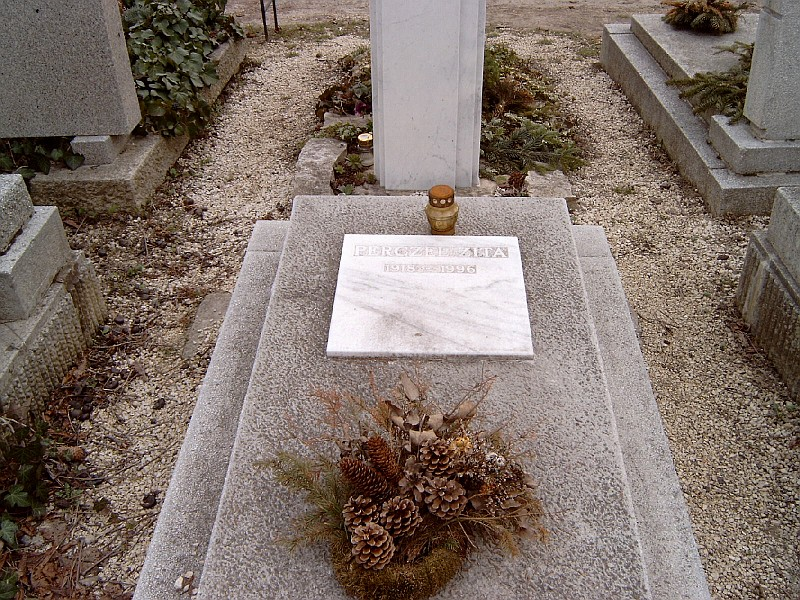 Perczel Zita (Budapest, 1918. április 26. - Budapest, 1996. április 4.) színésznő sírja Budapesten. Farkasréti temető: 25-1-64/1